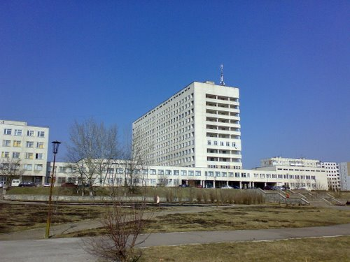 Міська лікарня № 2 (Біла Церква)